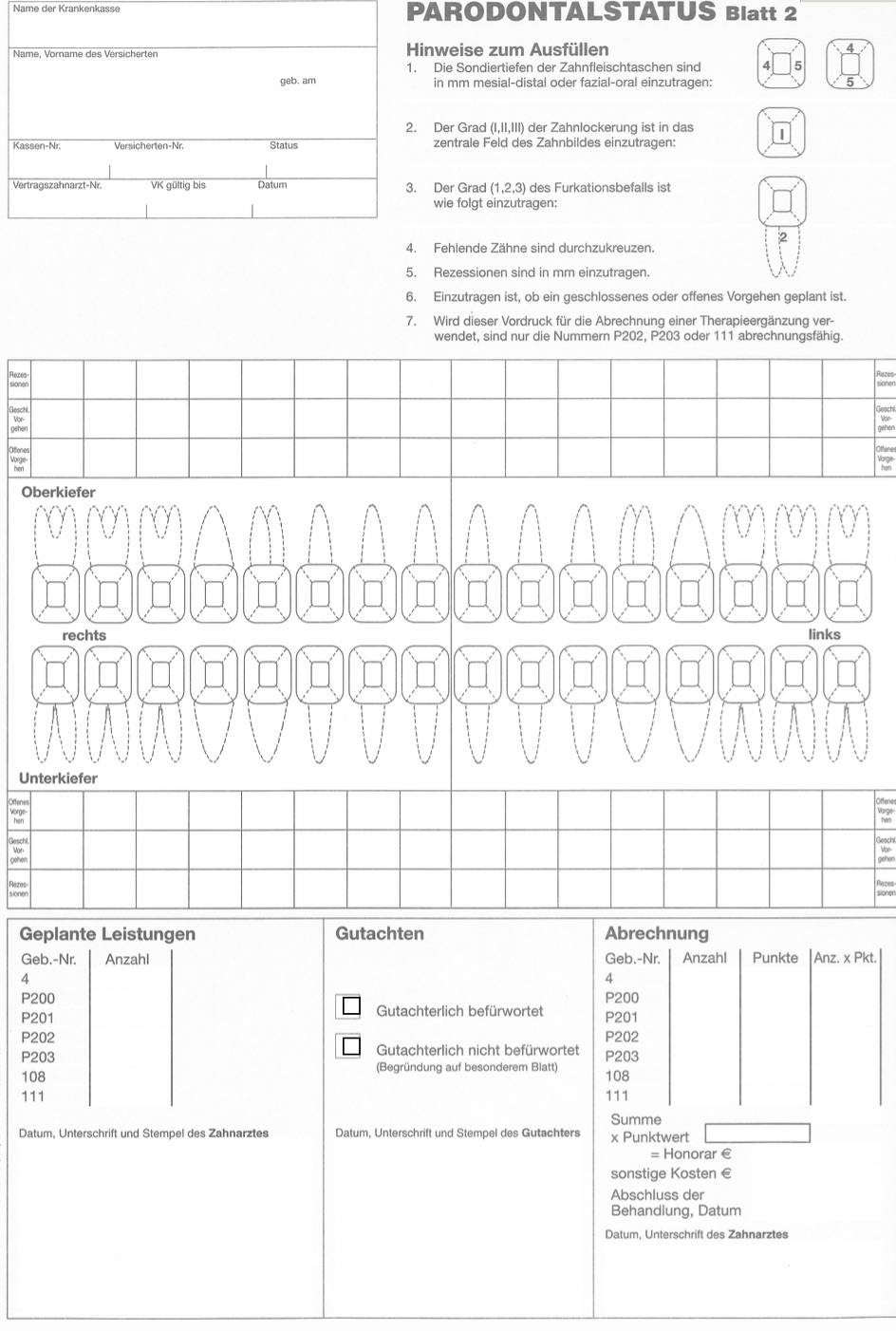 Offizieller Parodontalstatus als Antrag für die gesetzlichen Krankenkassen in Deutschland Blatt 2